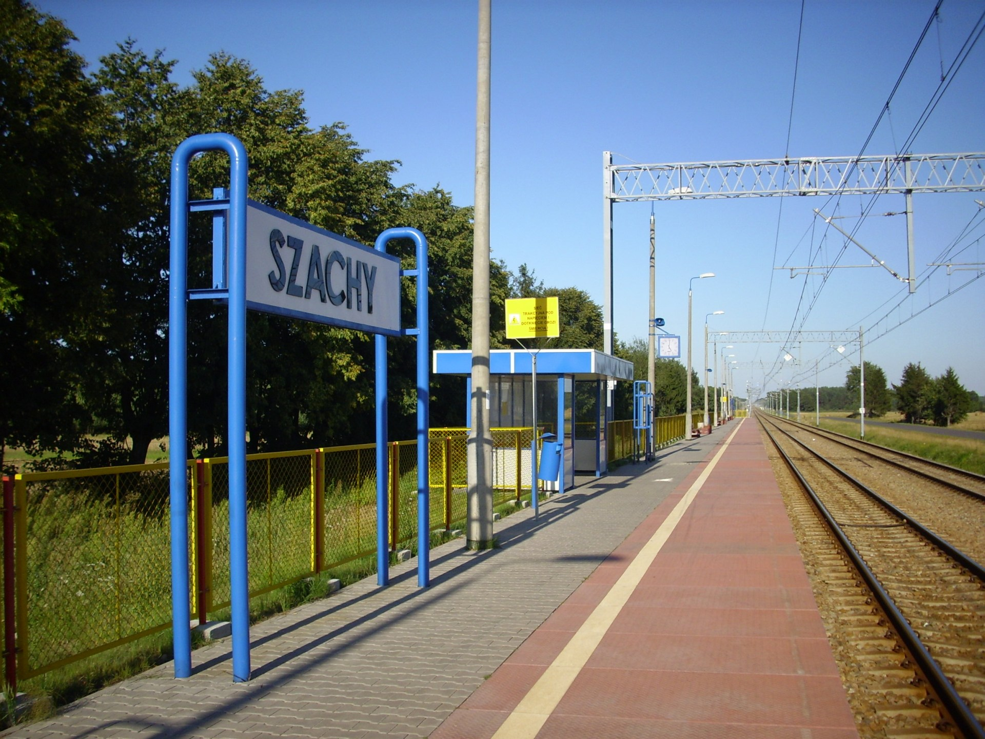 Szachy (powiat bialski). Przystanek osobowy po modernizacji.